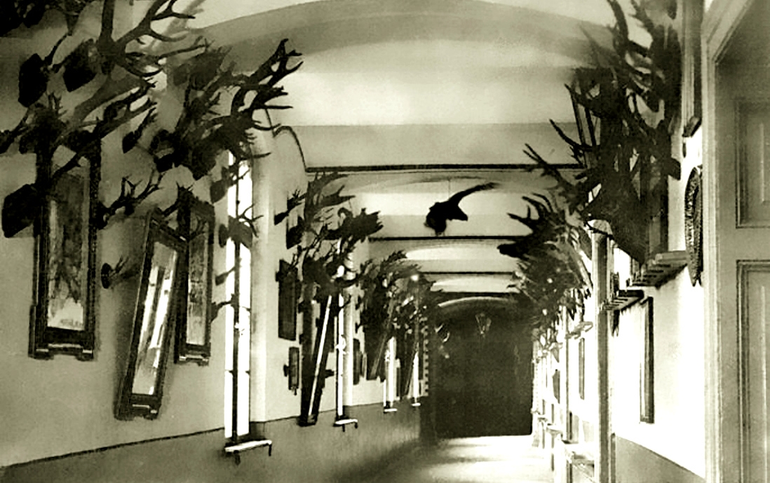 Jägerkaserne Lübben, Korridor mit Trophäen der 3. Kompanie.